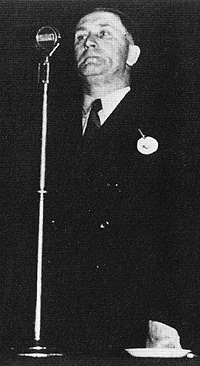 Johannes Gerhardus Strijdom (15 July 1893 - 24 August 1958), former Prime Minister of South Africa (Les documents (photographies, portraits) du gouvernement sud africain ou ceux supérieurs à plus de 50 ans sont ou tombent dans le domaine public.)